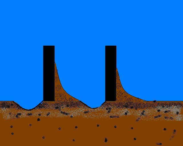 凸堤效應步驟三